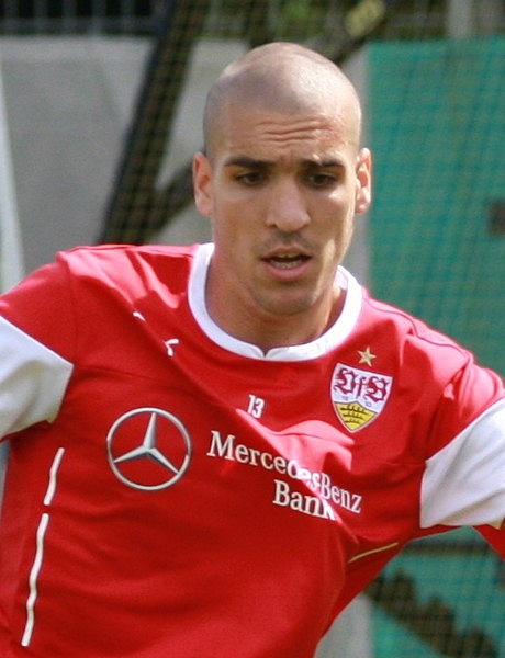 Oriol Romeu beim Training des VfB Stuttgart. Aufgenommen von